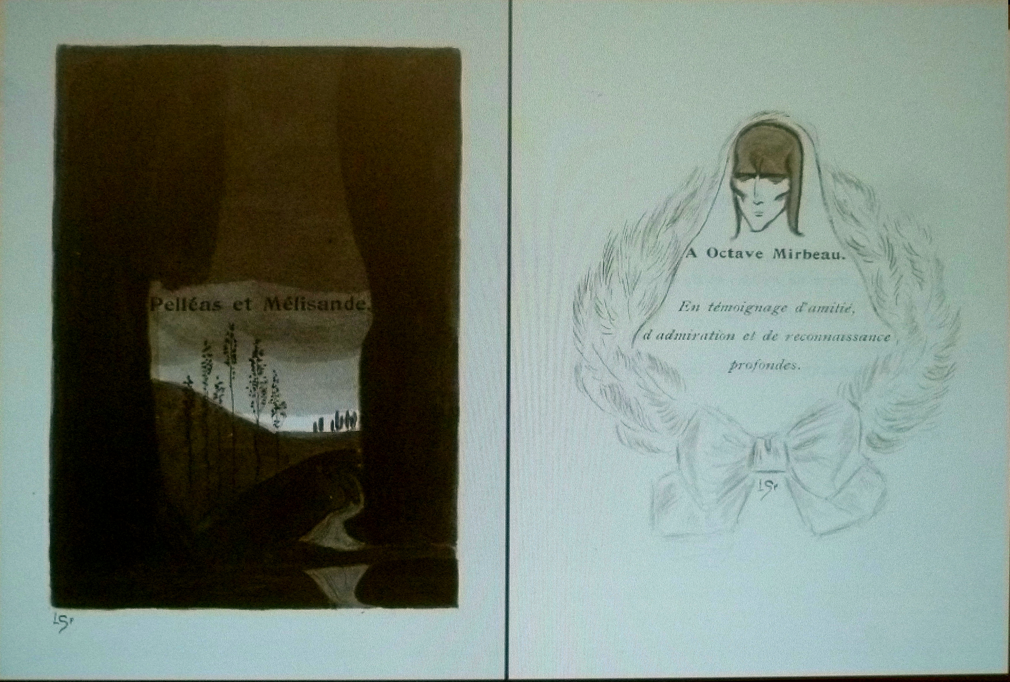 "Pelléas et Mélisande" in Théâtre, Maeterlinck - links : titelblad; rechts: opdracht aan Octave Mirbeau; illustraties door Léon Spilliaert (1903); privébezit